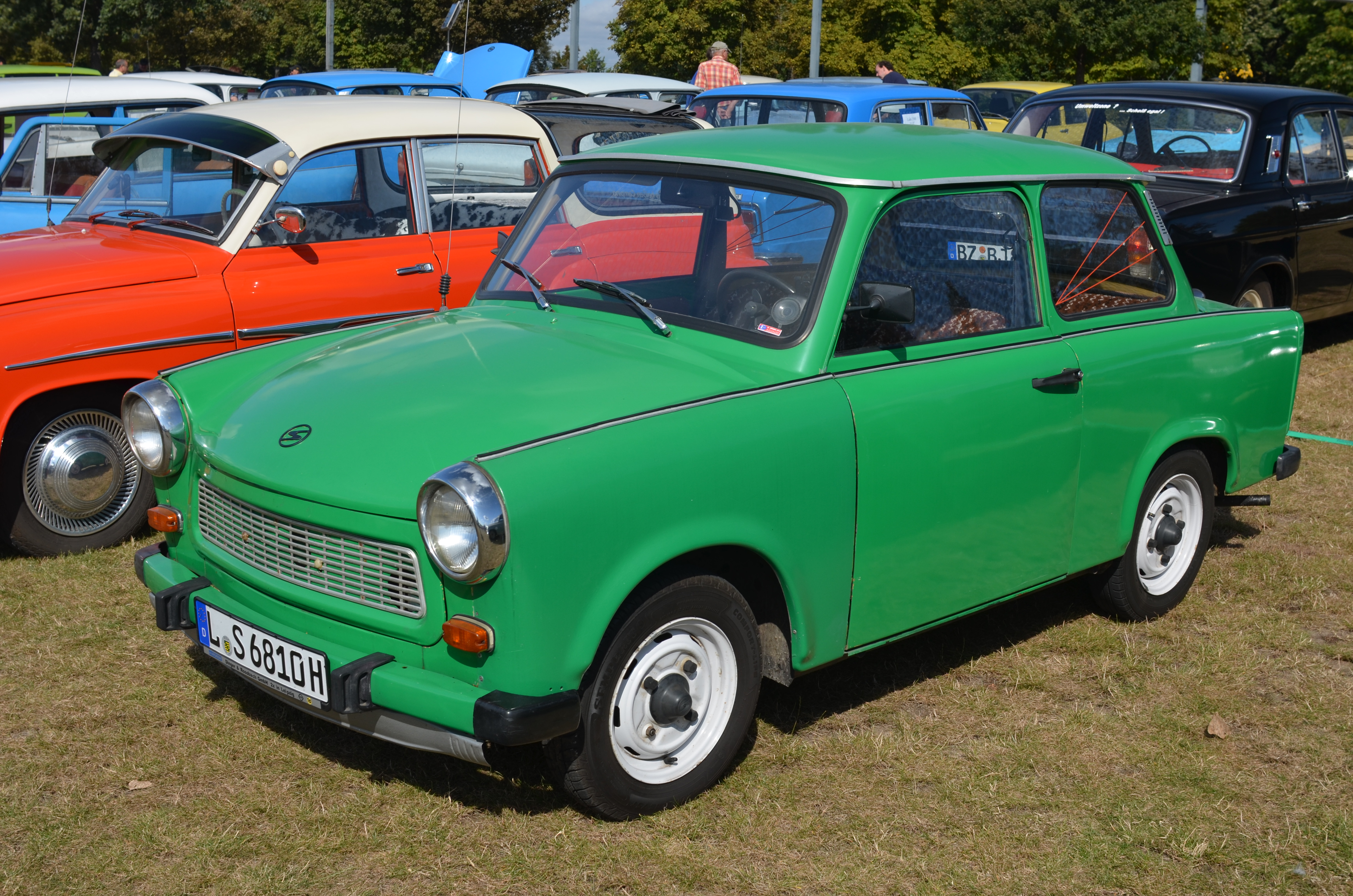 Trabant